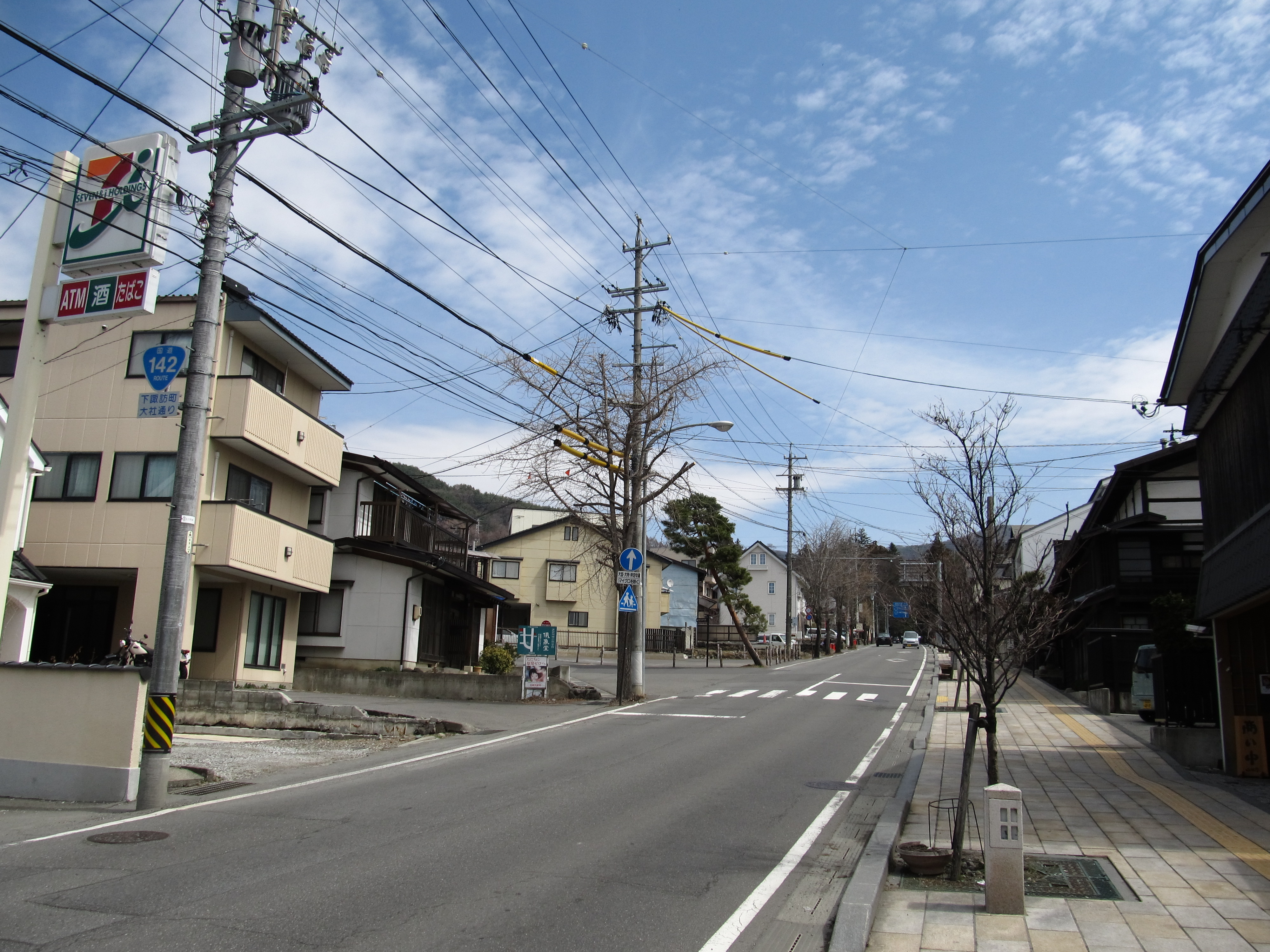 長野県諏訪郡下諏訪町を通る国道142号。終点の大社通り交差点より少し東に進んだところから諏訪大社下社秋宮方面を撮影。